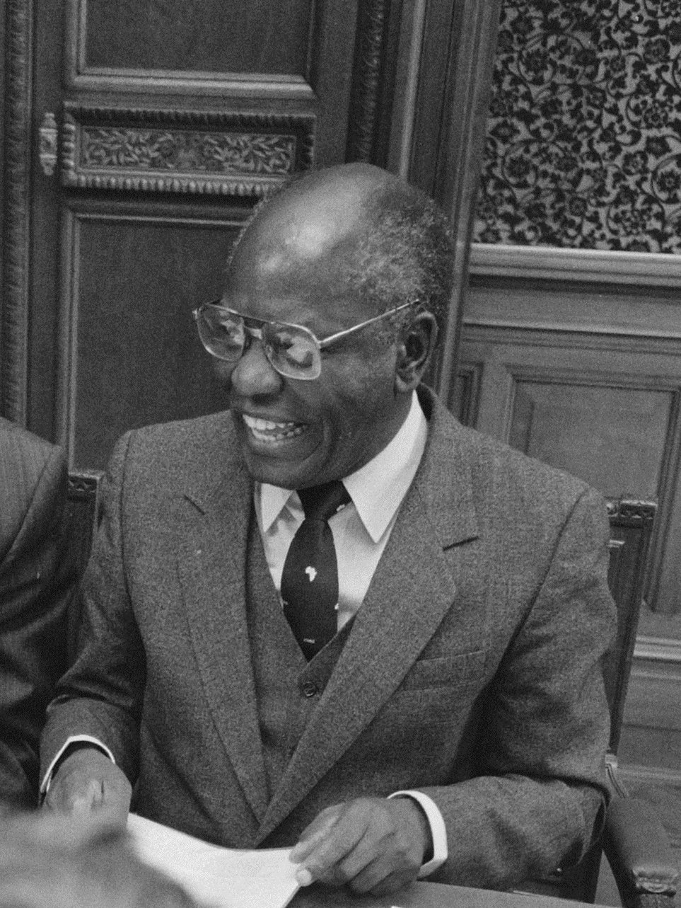 Oprichting African European Institute : D. Mutasa (voorzitter parlement Zimbabwe)